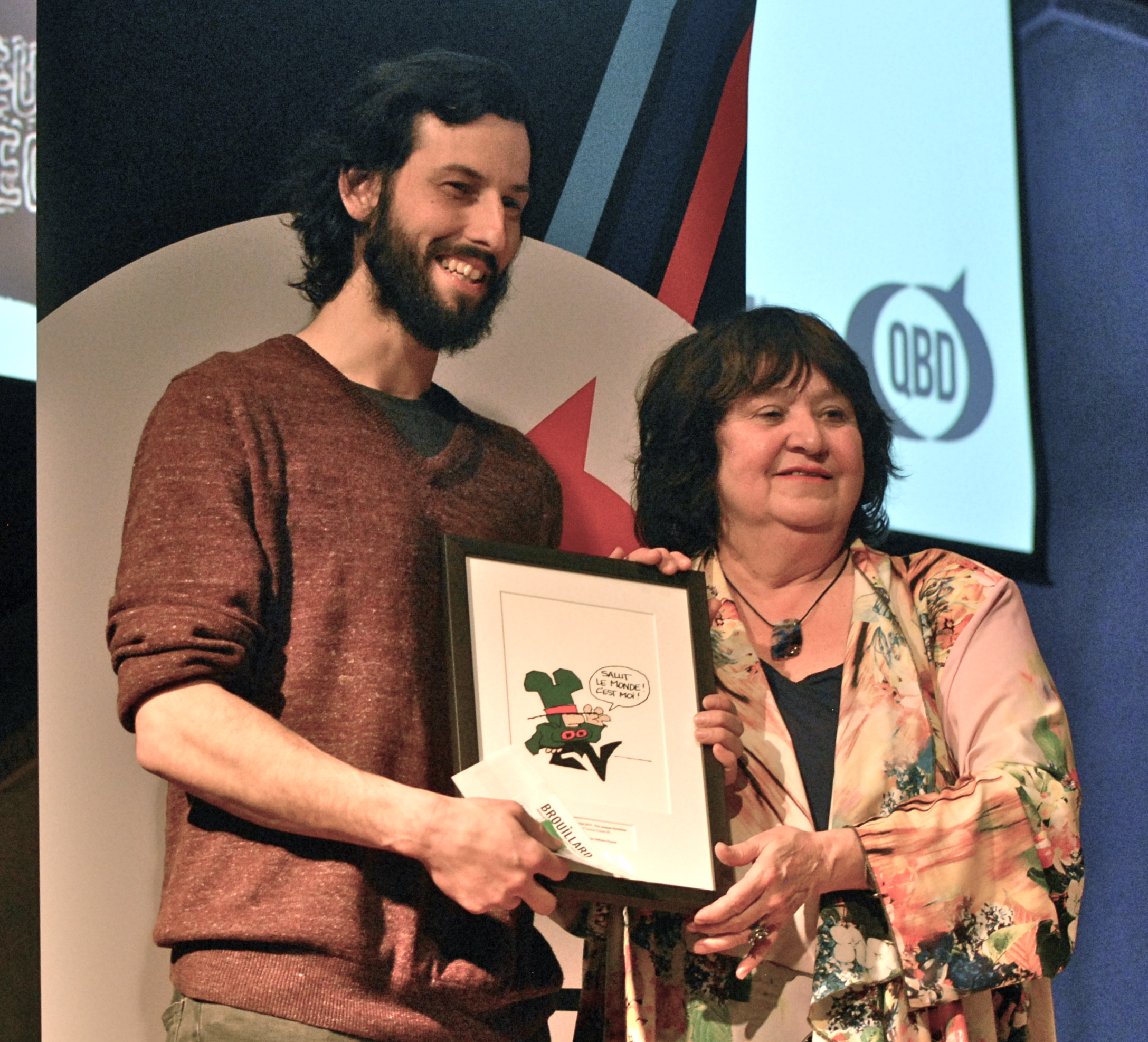 Julien Dallaire-Charest reçoit le prix Jacques-Hurtubise, présenté par Hélène Fleury, lors de la soirée des prix Bédéis Causa 2019 au Musée de la civilisation à Québec.